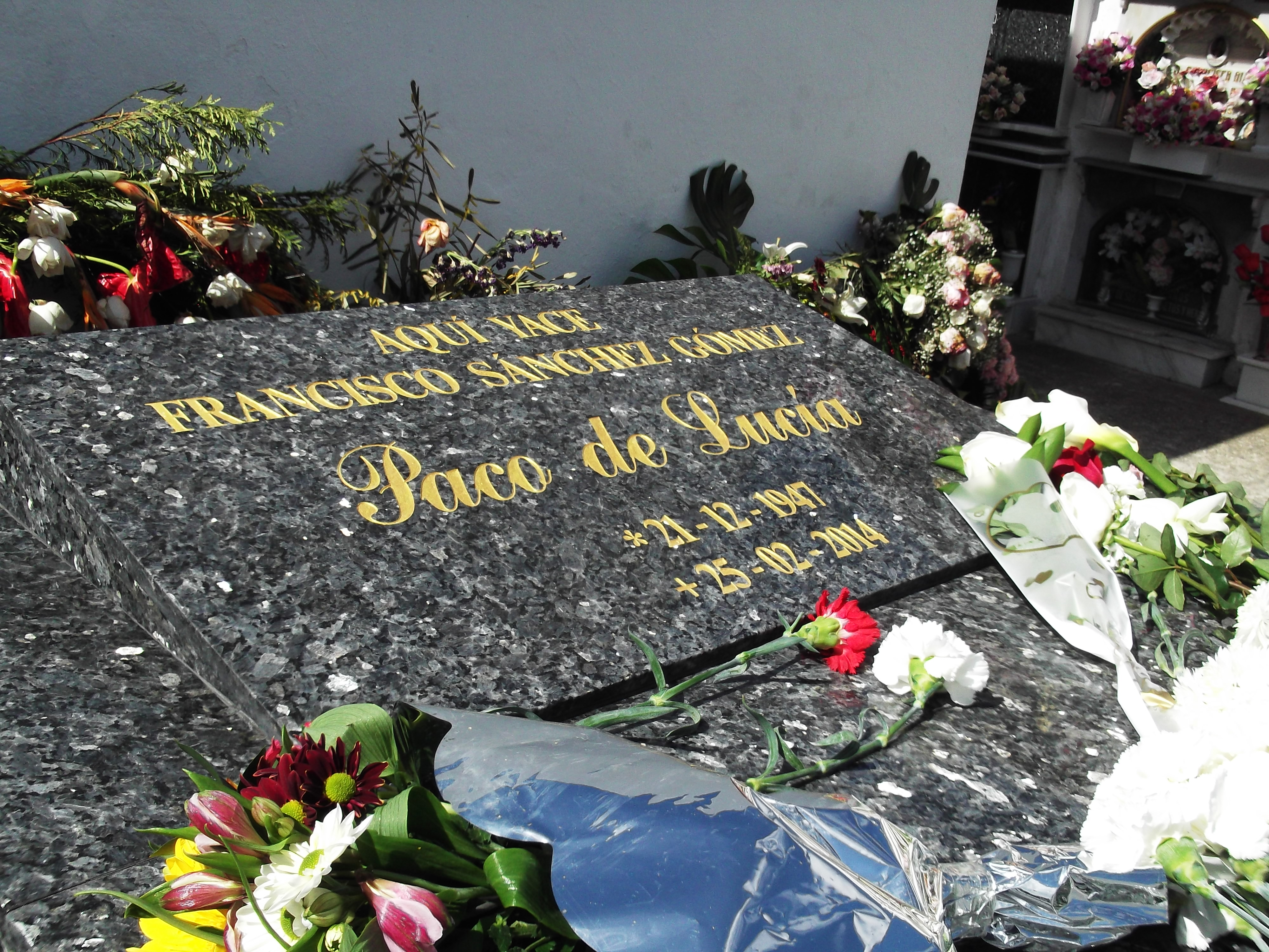 Lápida de Francisco Sánchez Gómez "Paco de Lucía" en el cementerio municipal de Algeciras.